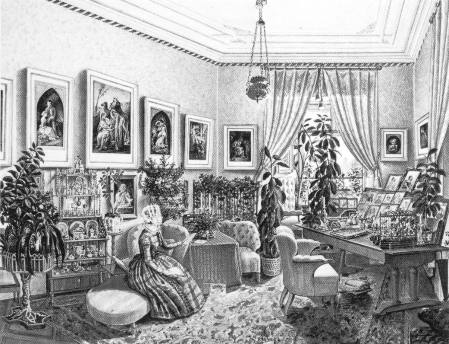 Wiener Interieur, Gouache